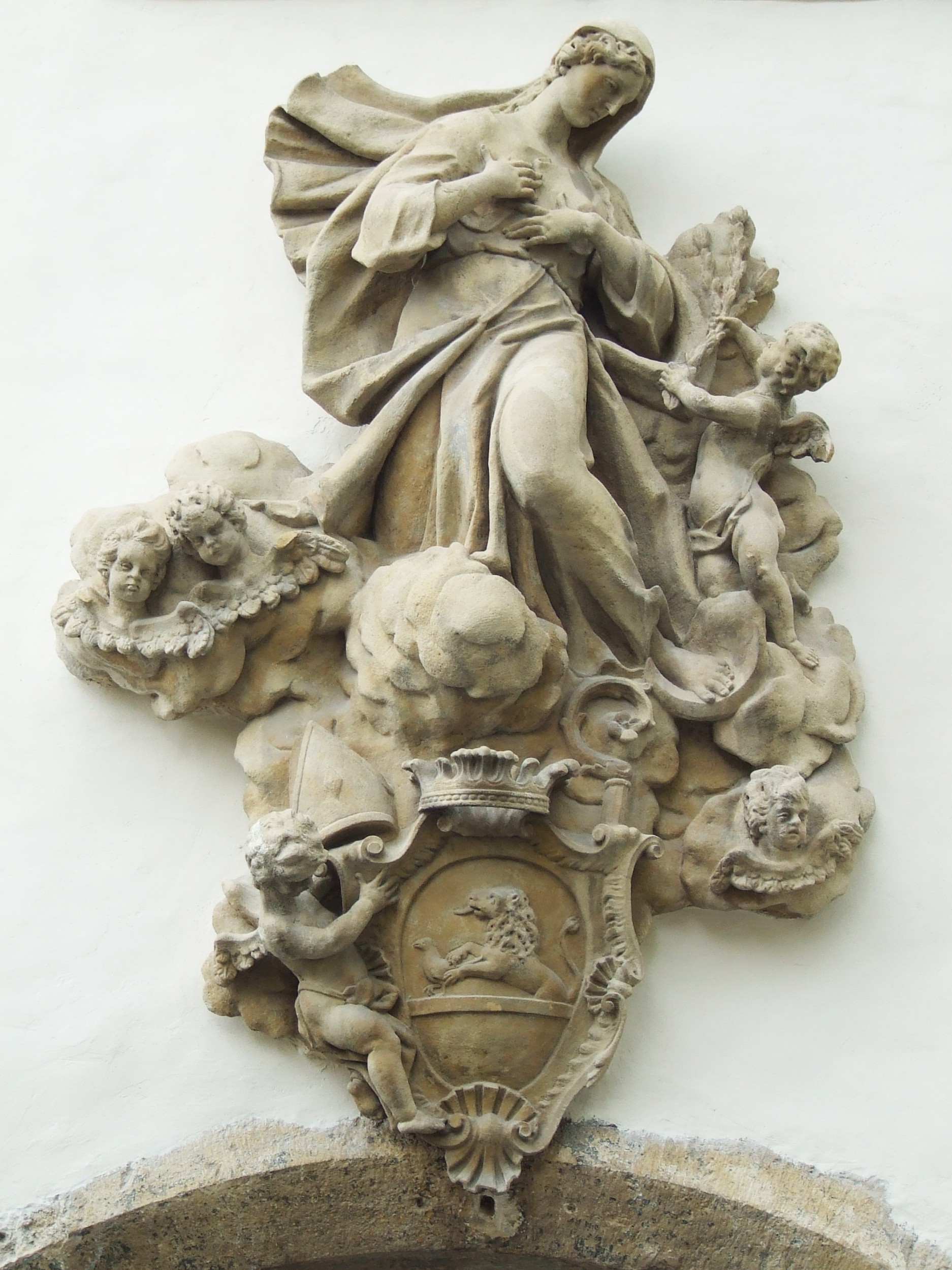 Dombormű a pécsi Zsolnay Múzeum homlokzatán. Antonio Giuseppe Sartori alkotása